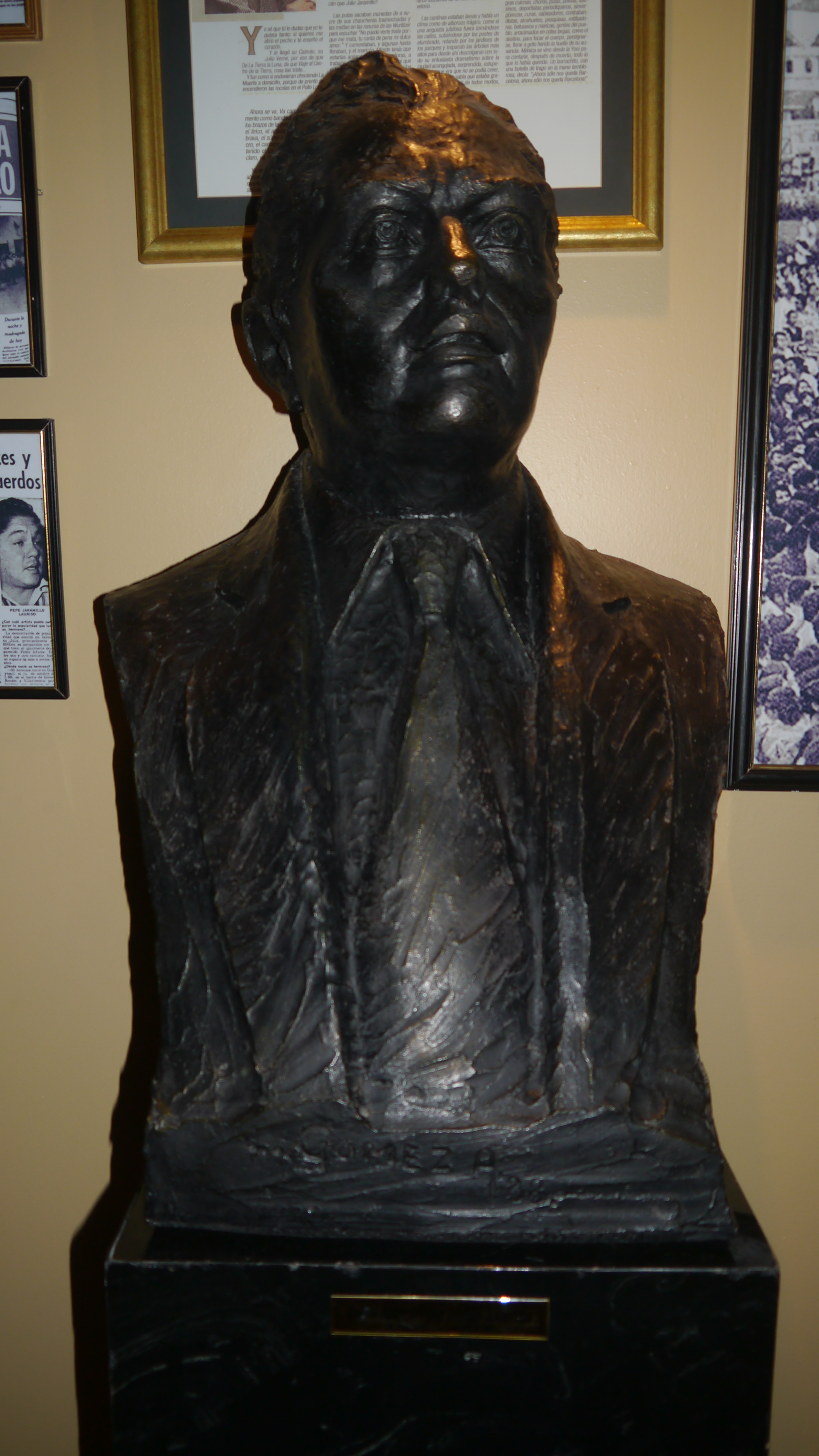 Busto de Julio Jaramillo en el Museo de la Música Popular